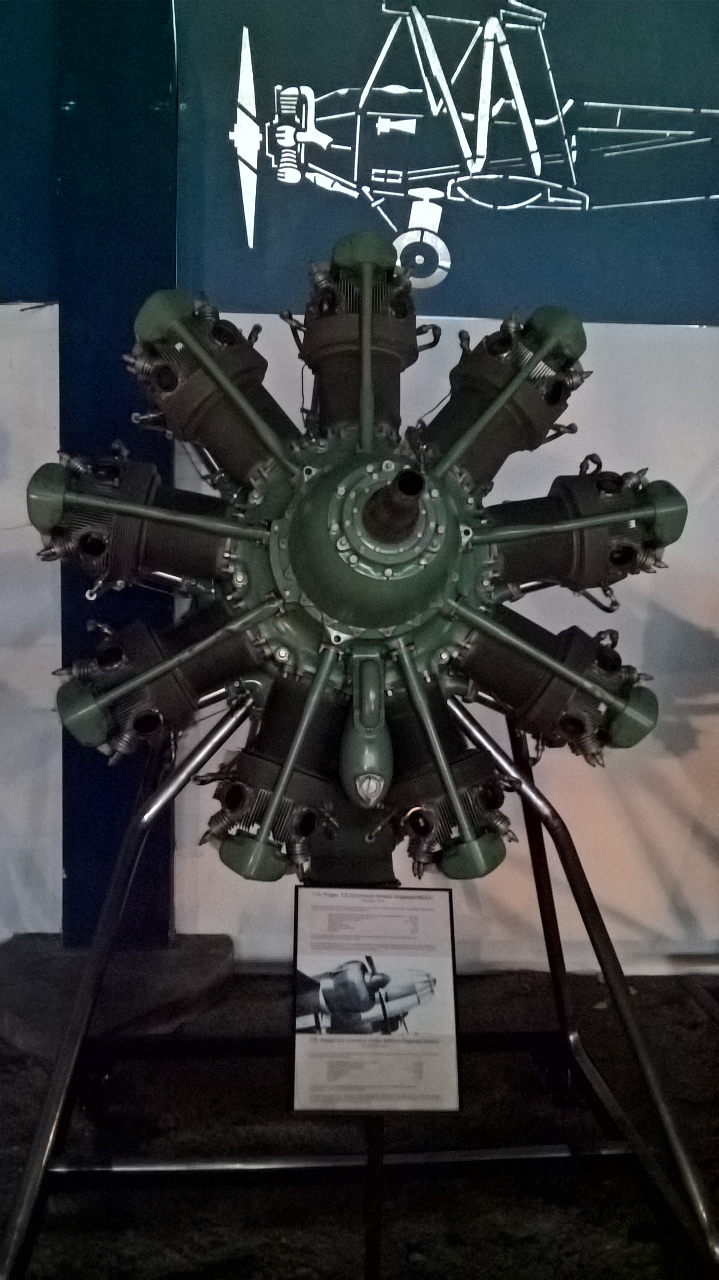 Licencyjny 9-cylindrowy silnik gwiazdowy Bristol Pegasus XX z 1938 r., produkowany pod nazwą PZL Pegaz XX (używany do napędu samolotów bombowych PZL.37B Łoś), ze zbiorów Muzeum Lotnictwa Polskiego w Krakowie.